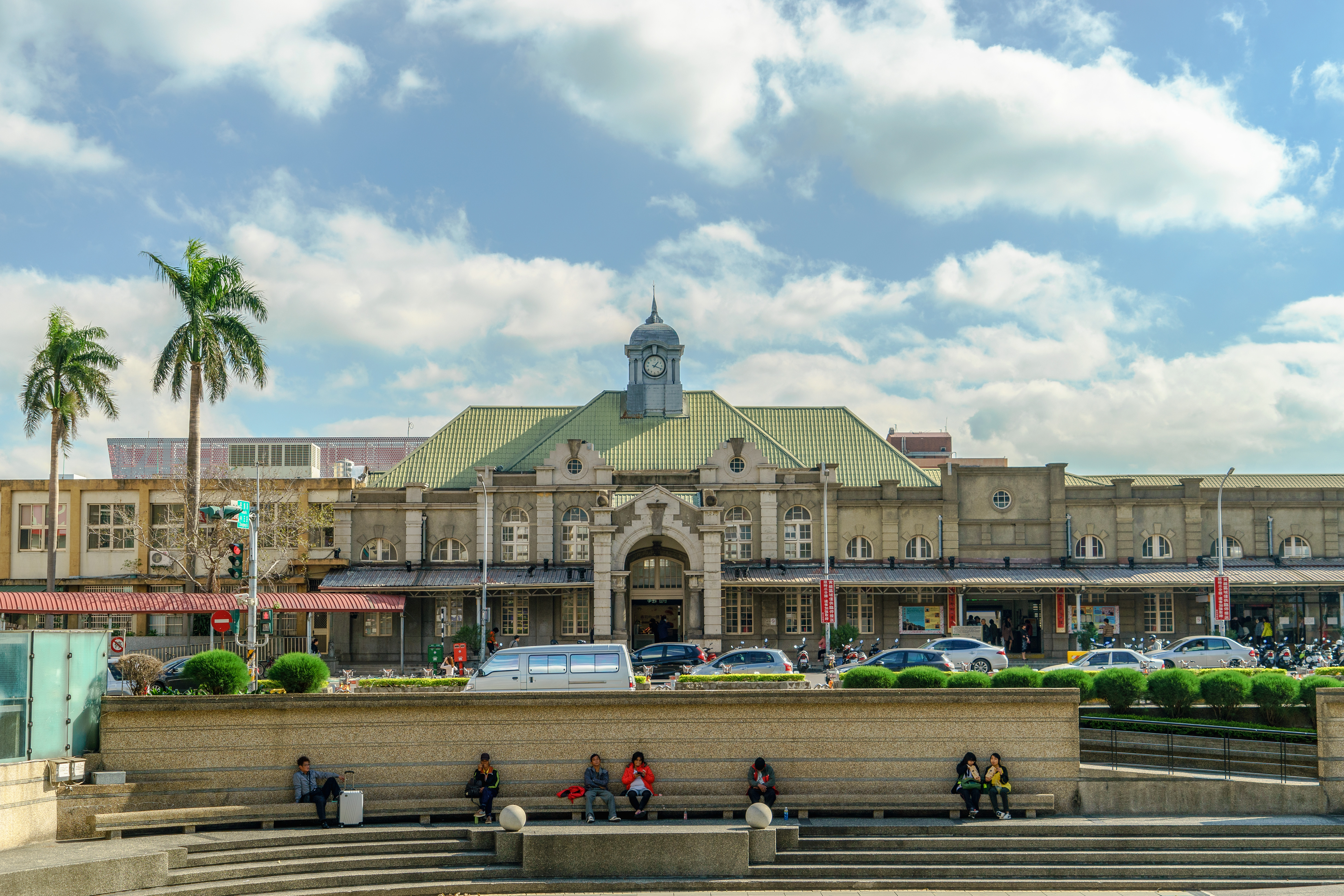 新竹火車站，兼有巴洛克風格與德式歌德風的美麗建築